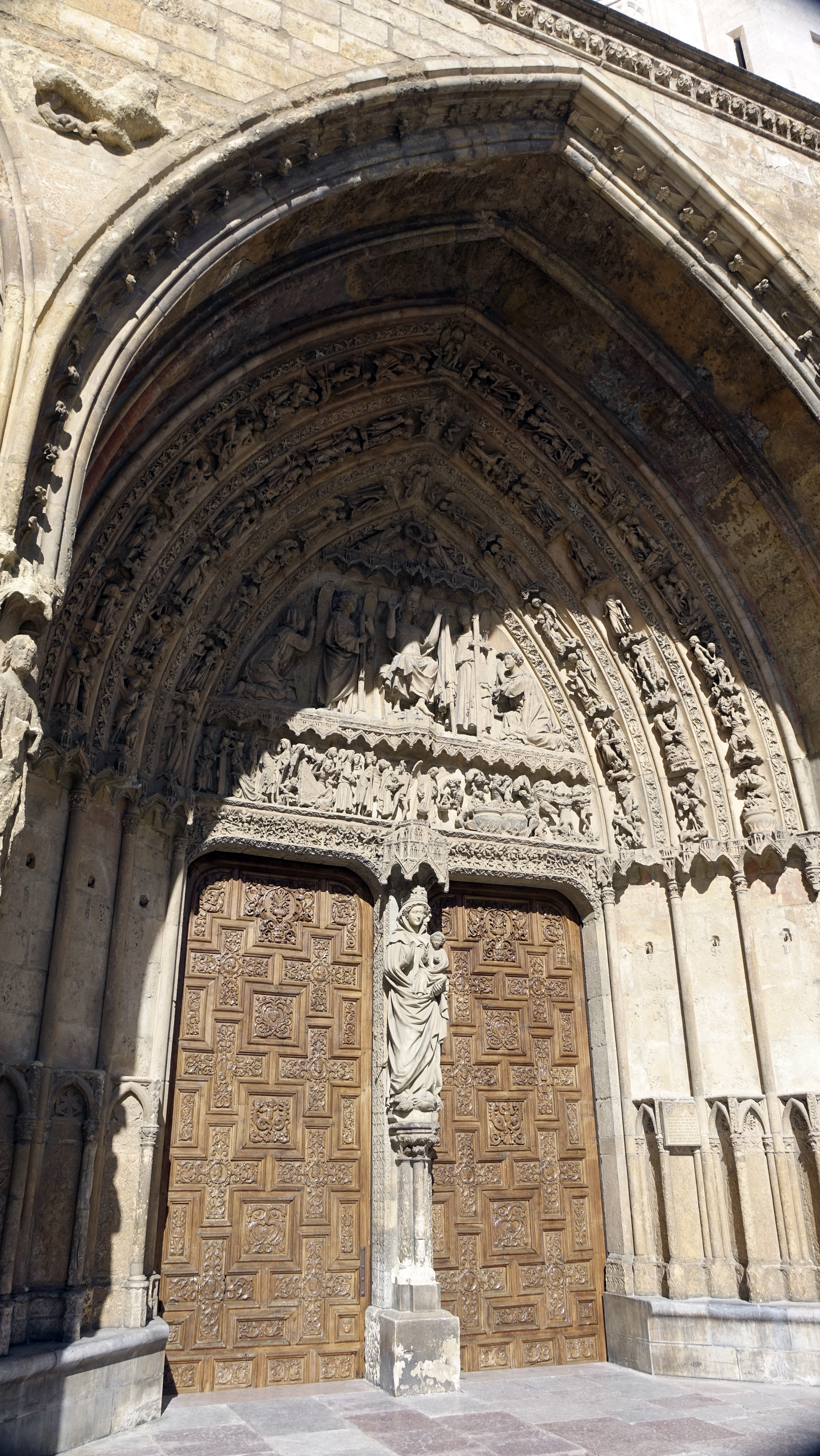 Portada de la Virgen Blanca o del Juicio Final, catedral de León.